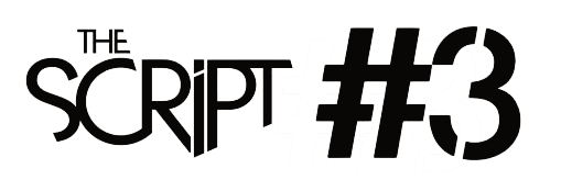 Logotipo para la portada del álbum #3 de The Script